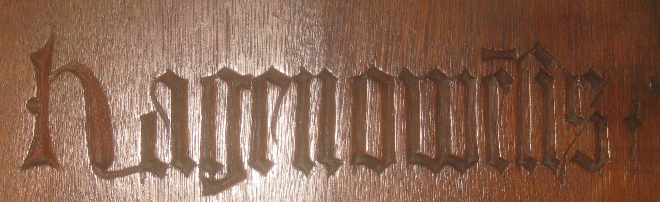 Chorgestühl der Leonhardskirche, Südostfassade, vordere Sitzreihe, rechte Hälfte, Inschrift „Hagenowēsis“ (ē = en, Hagenau) an der Rücklehne von Sitz 7.